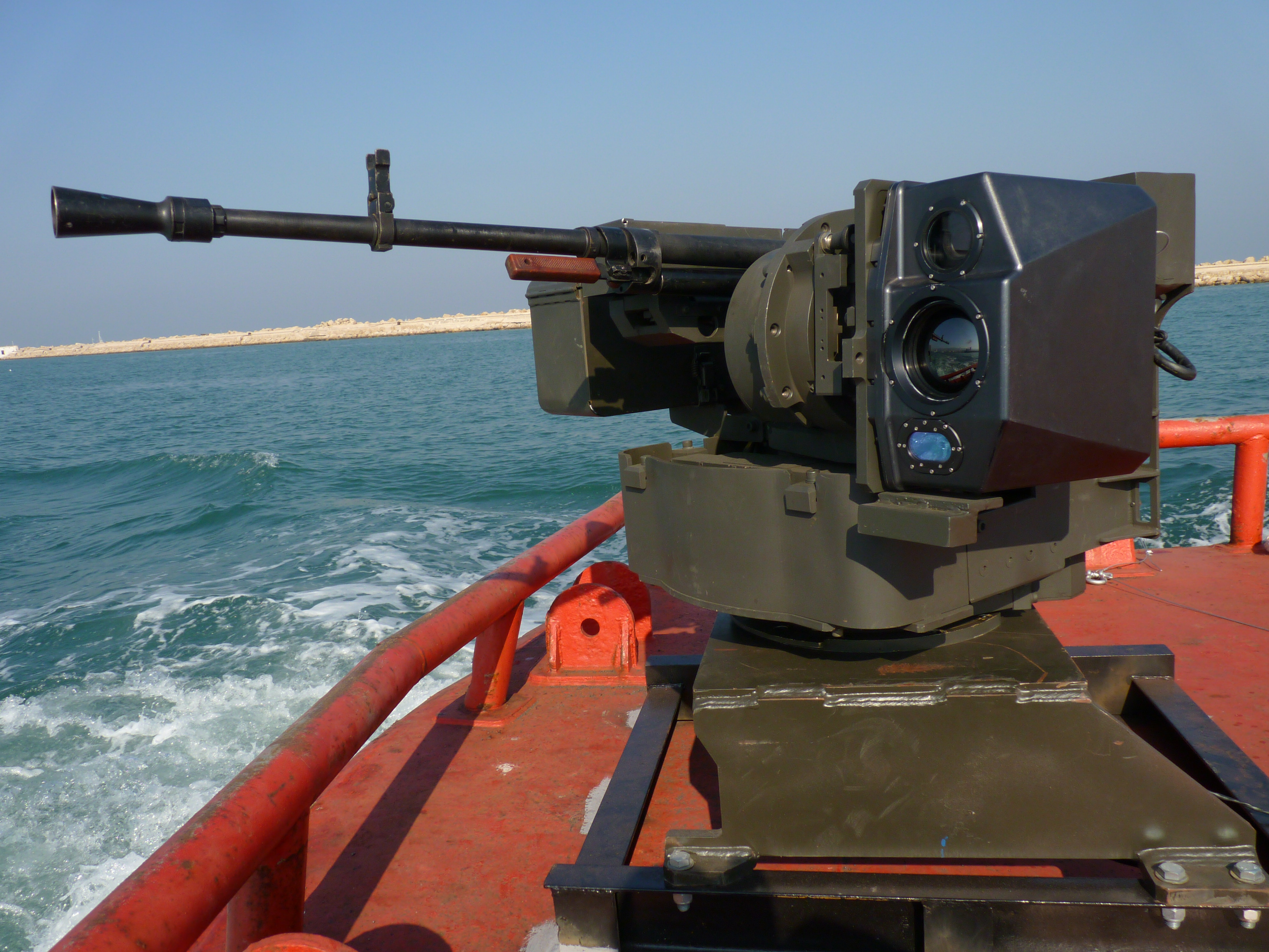 עמדת נשק ימית - פיתוח תעש מערכות